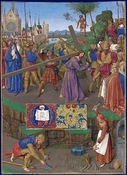 Le Christ portant sa croix aidé de Simon de Cyrène et menacé par des soldats, au sein d'une procession quittant une ville et gravissant une colline. Derrière le Christ se tient la Vierge. A l'arrière plan est représenté Judas se suicidant, pendu à un arbre. La Sainte-Chapelle domine la ville au loin. Au premier plan sont représentés deux personnages, dont une femme, forgeant des outils qui serviront d'instruments de la Passion du Christ. Au-dessus d'eux se trouve un cartouche contenant une lettrine « D » dans laquelle est représentée Sainte Véronique présentant la sainte face. Le texte à droite a été masqué.